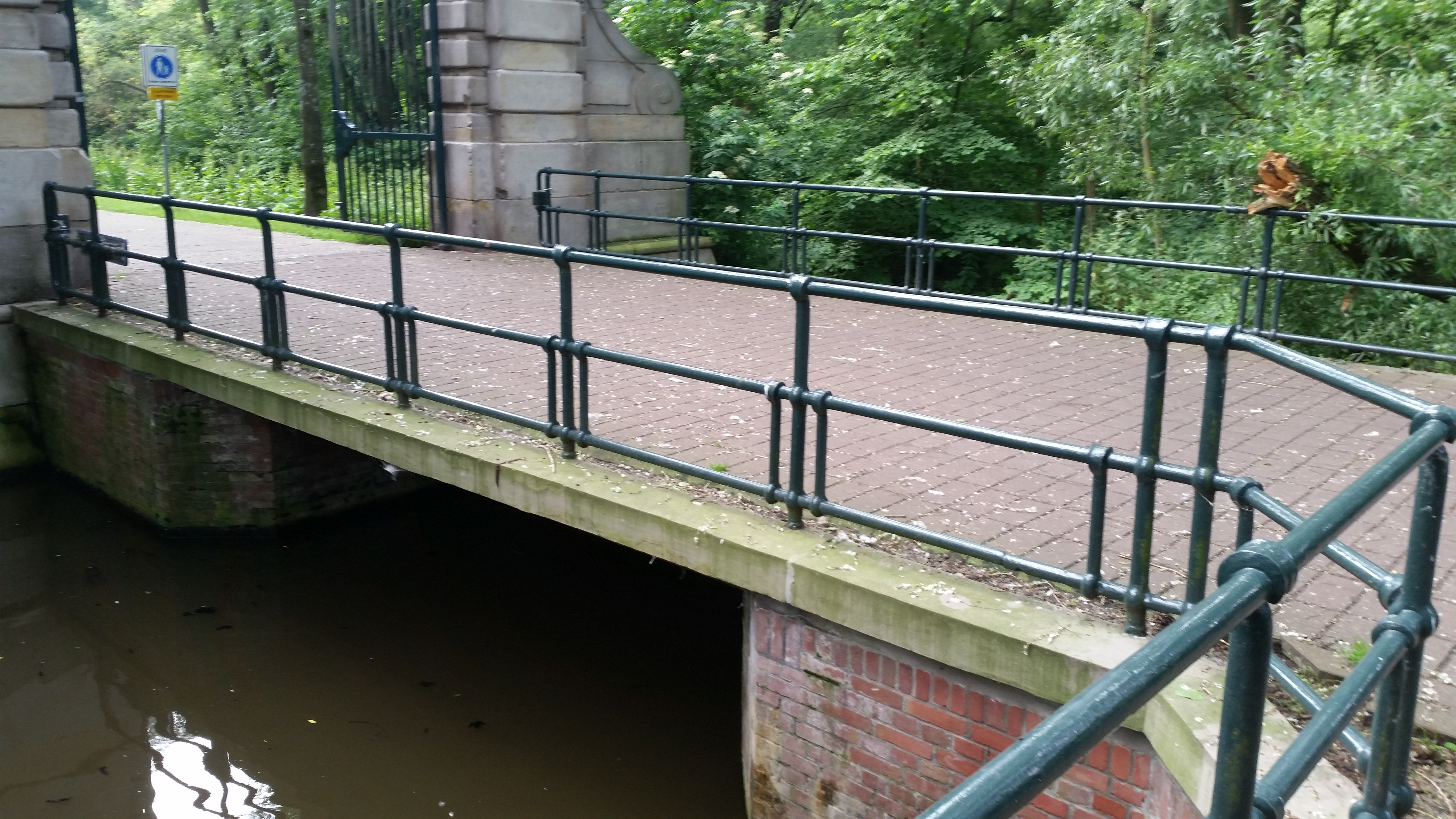 Brug 196, Titaantjesbrug in Amsterdam-Oost, overspanning